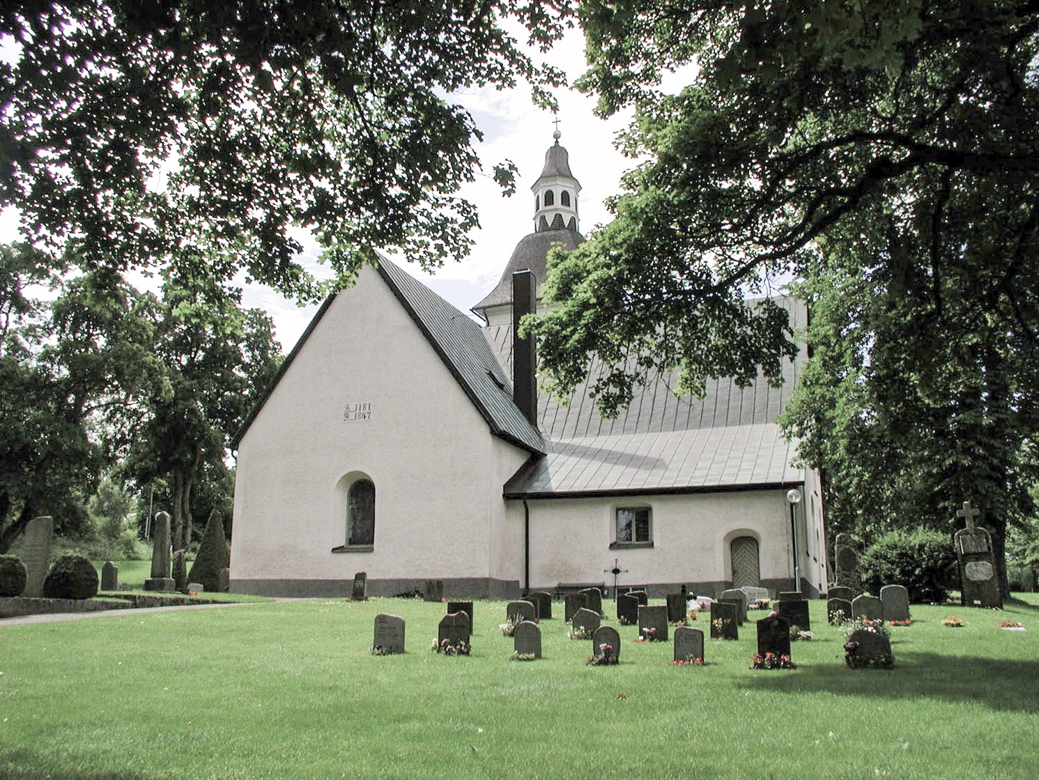 Åsbo kyrka.